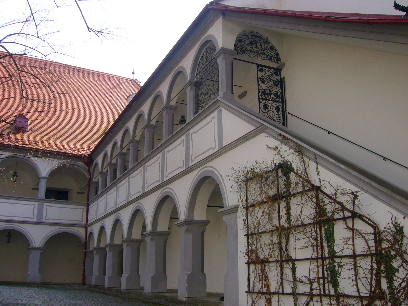 Summary Bildbeschreibung: Schloss Scheibbs Quelle: selbst gemacht Fotograf/Zeichner: Calauer Datum: 10-04-06